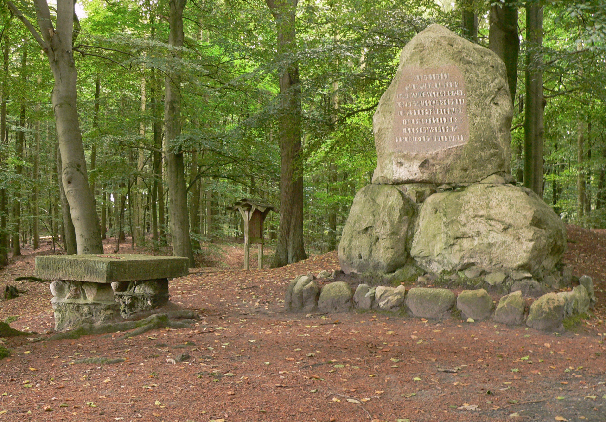 Denkmal für die Gründung der Vereinigten Norddeutschen Liedertafeln au f dem Oyler Berg im Bereich der Wallburg Alte Schanze